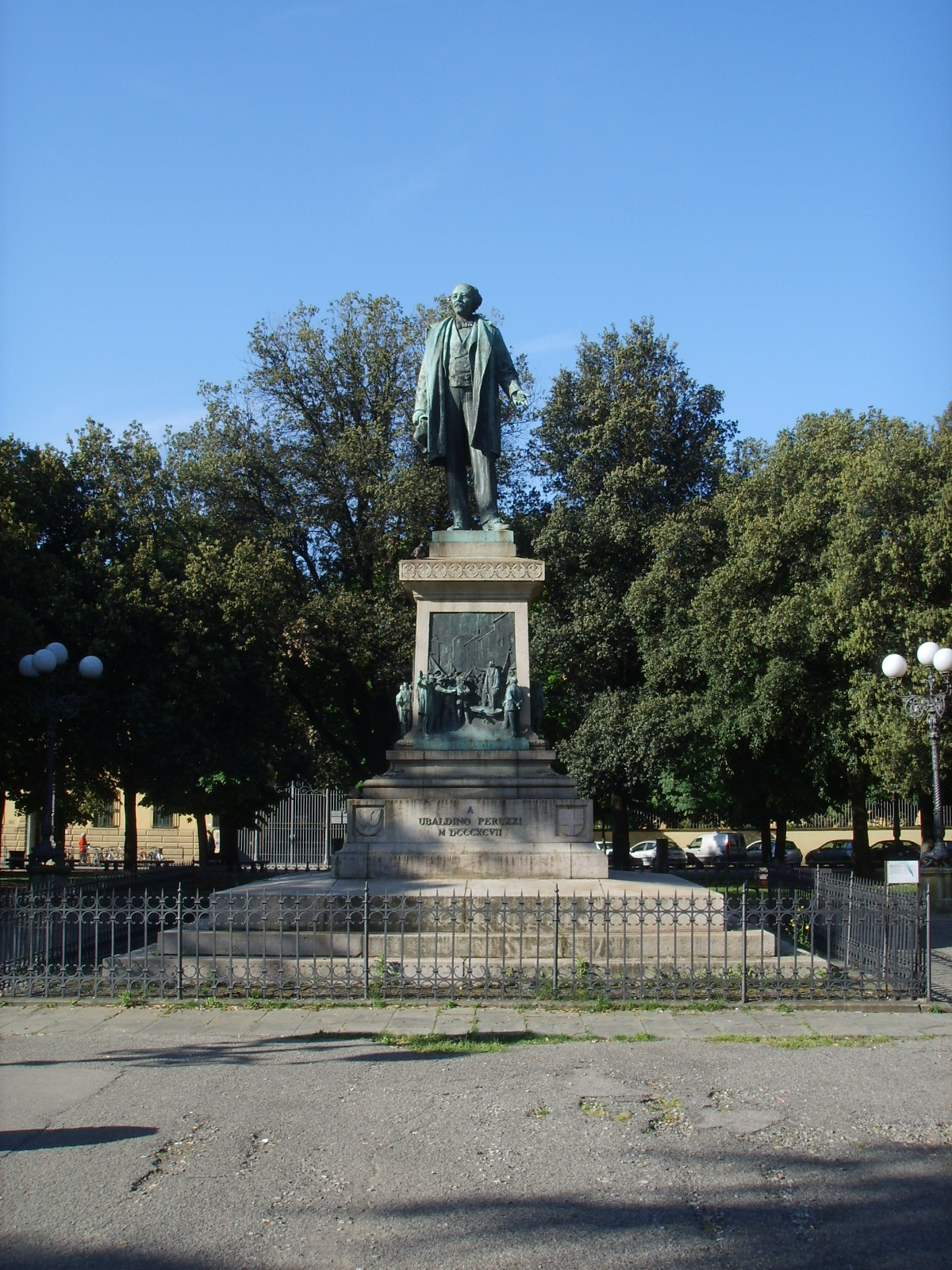 Piazza dell'inipendenza statua ubaldino peruzzi